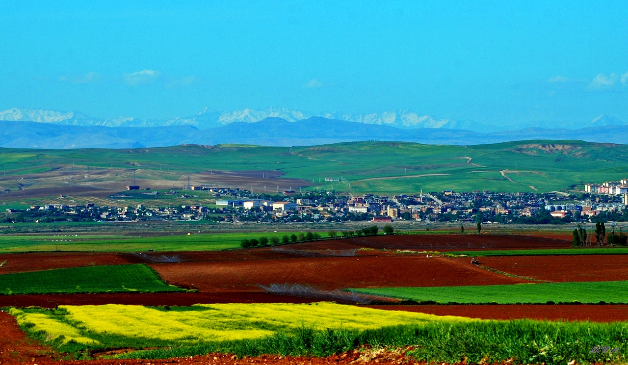 Kurdî: Ji Gundê melemûs dîtina bismil û çiyayên farqînê